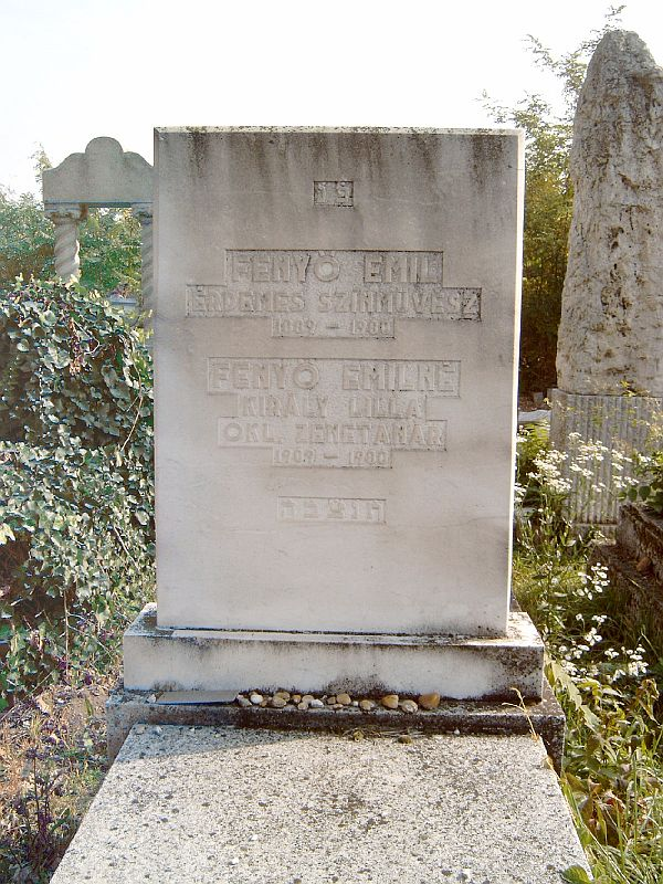 Fenyő Emil (Magyarkanizsa, 1889. március 18. – Budapest, 1980. augusztus 15.) színész, érdemes művész (1964), Fenyő Aladár bátyjának sírja Budapesten. Kozma utcai iraelita temető: 5B-9-31